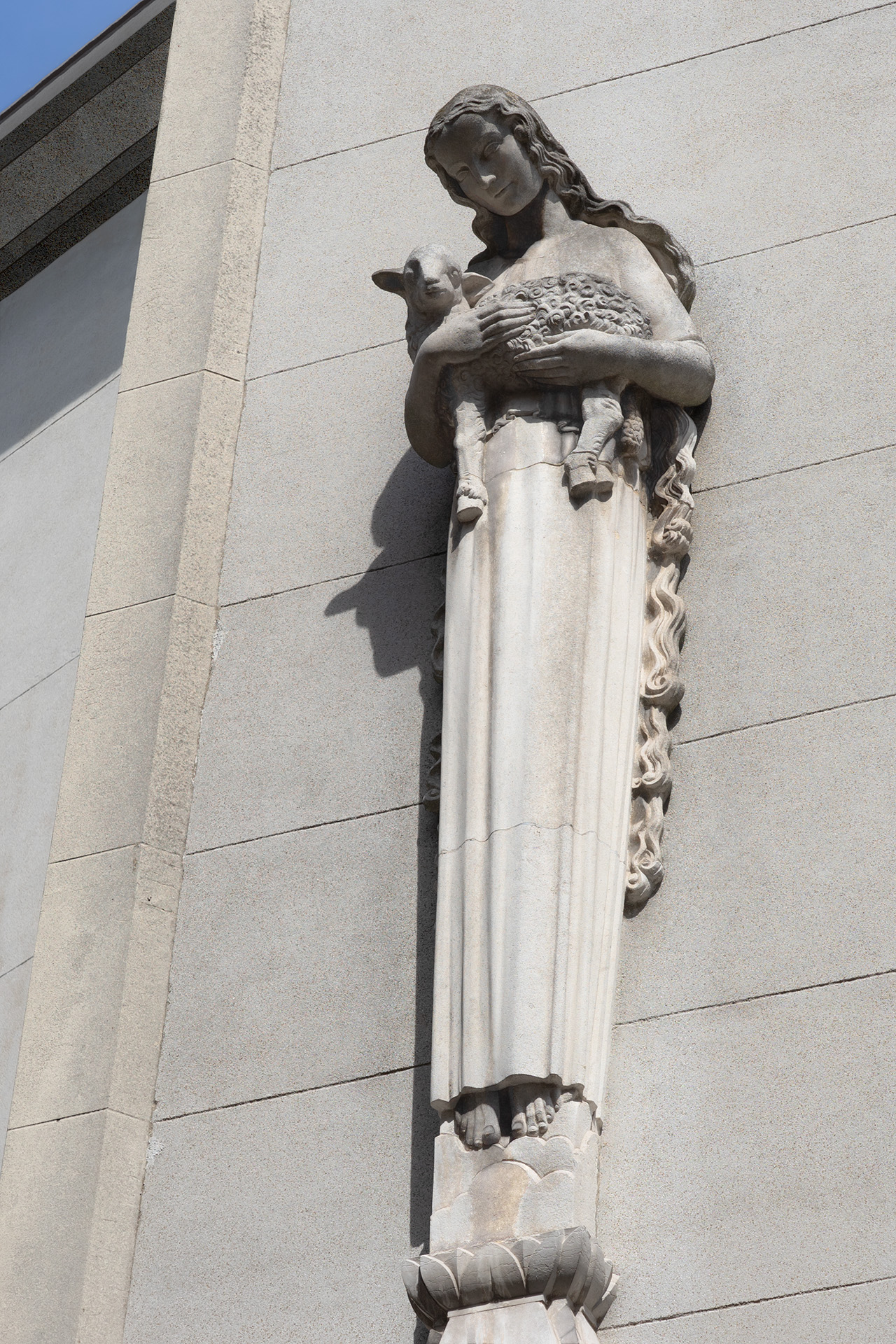 Le sculpteur Gabriel Rispal a créé cette oeuvre originale représentant Sainte Agnès, serrant contre son torse un agneau figurant Jésus Christ. Cette statue de 4 mètres en pierre de Chauvigny surmonte le portait d'entrée de l'église.